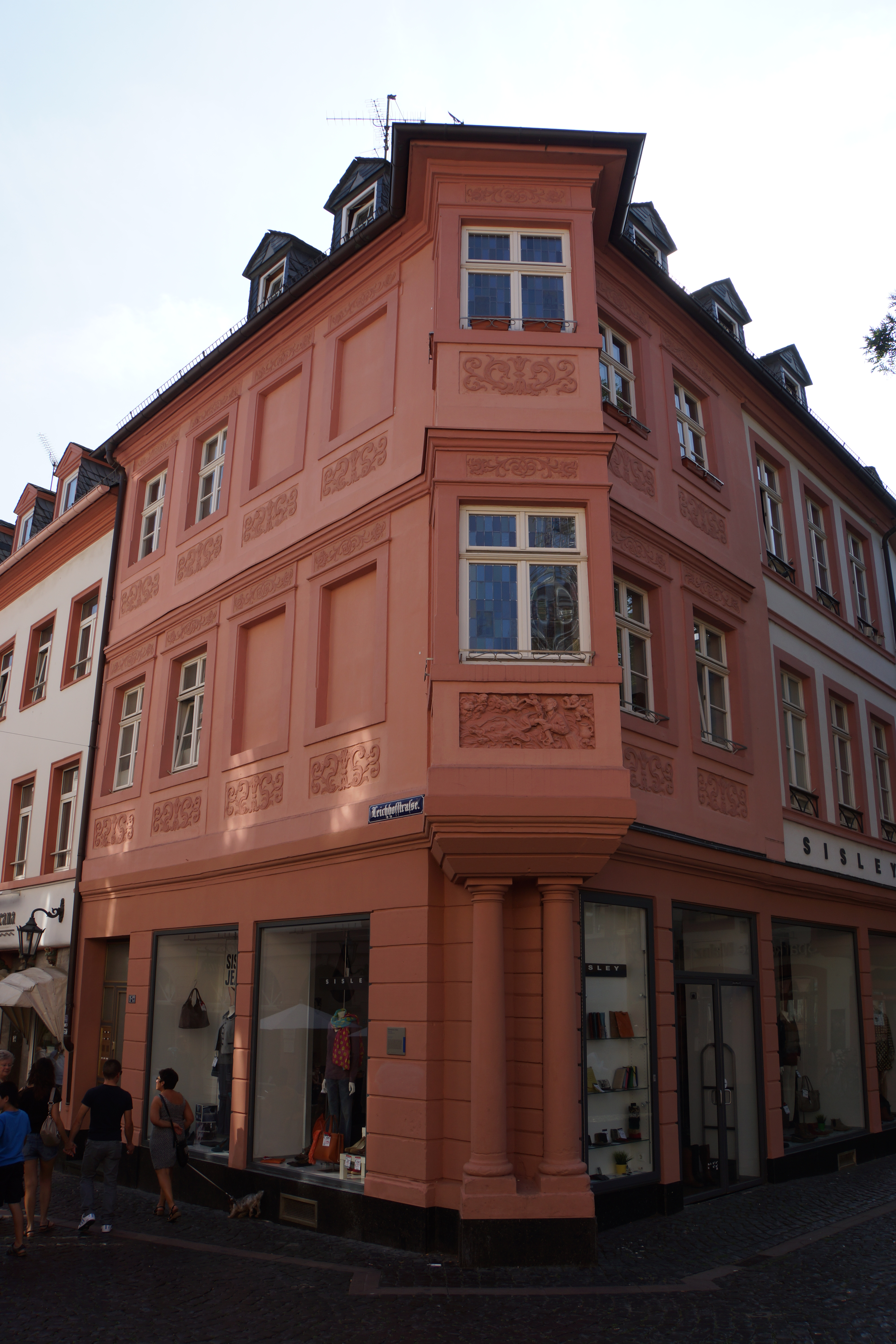 Haus Zum Frauenstein, auch Zur Bechtelmünz genannt, Ecke Leichhofstraße 11, Leichhof 13 in der Mainzer Altstadt. Dreigeschossiges barockes Eckwohn- und Geschäftshaus, Walmdachbau mit Eckerker dessen Brüstungsreliefs um 1730 entstanden sind.